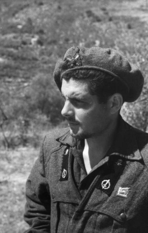 Marò della divisione San Marco, della Repubblica Sociale Italiana, 1944.